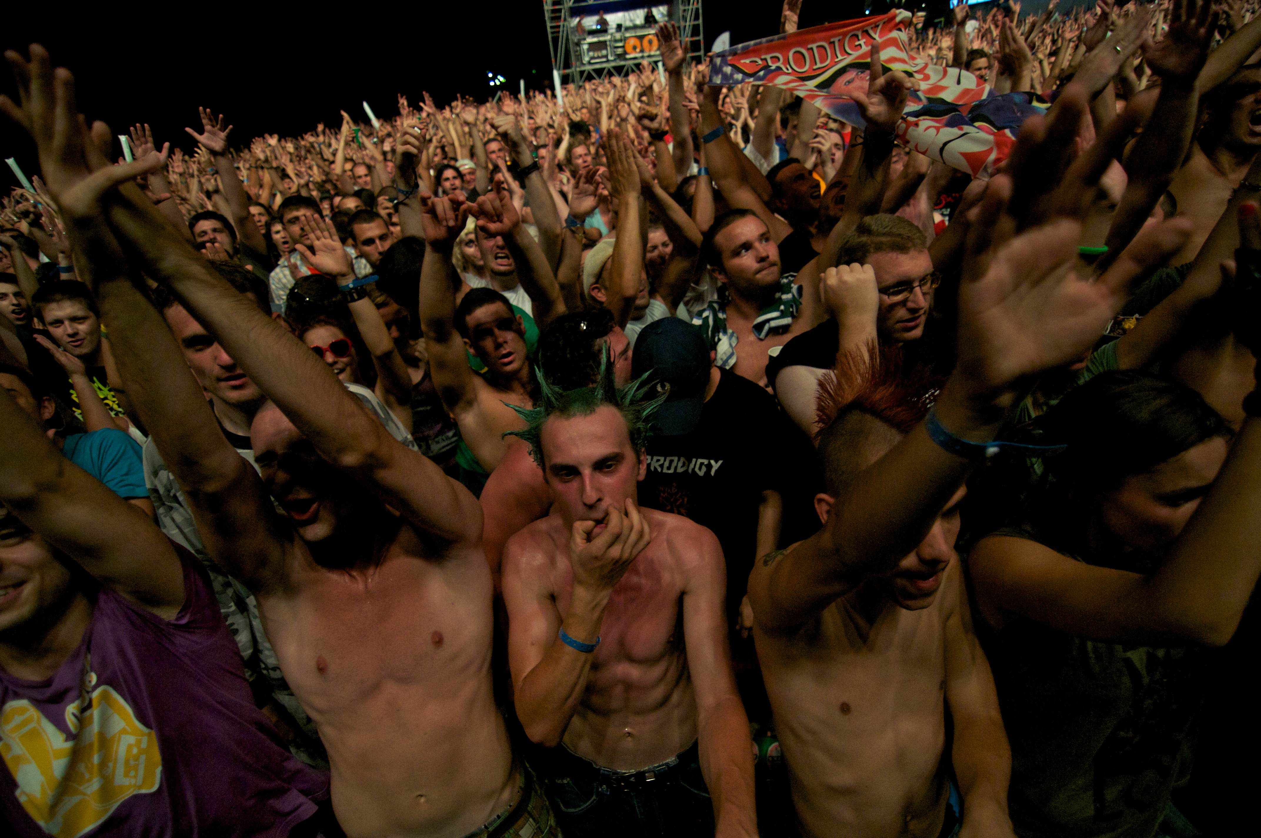 Фенове на Prodigy аплодират Apollo 440